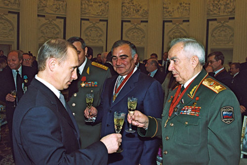 МОСКВА, КРЕМЛЬ. Церемония вручения государственных наград. С Президентом Кабардино-Балкарской Республики Валерием Коковым (в центре) и маршалом Советского Союза, председателем Комитета Госдумы по делам ветеранов Виктором Куликовым.